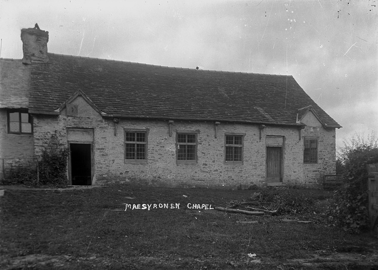 Ffotograffydd/Photographer: P B Abery (1877?-1948) Dyddiad/Date: [191-?] Cyfrwng/Medium: Negydd gwydr / Glass negative Maint/Dimensions: 119 x 163 mm. Cyfeiriad/Reference: PBA16/2 Rhif cofnod / Record no.: 4456457 Rhagor o wybodaeth am gasgliad P B Abery yn Llyfrgell Genedlaethol Cymru More information about the P B Abery Collection at the National Library of Wales